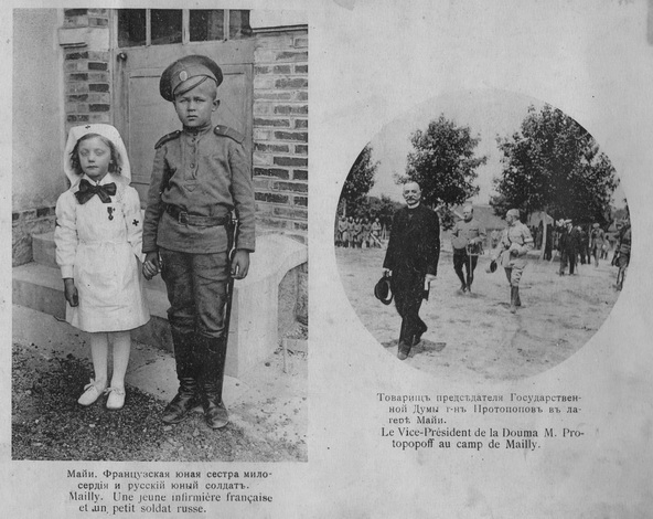 Русский экспедиционный корпус. Фотоальбом. Описание - на фотографии